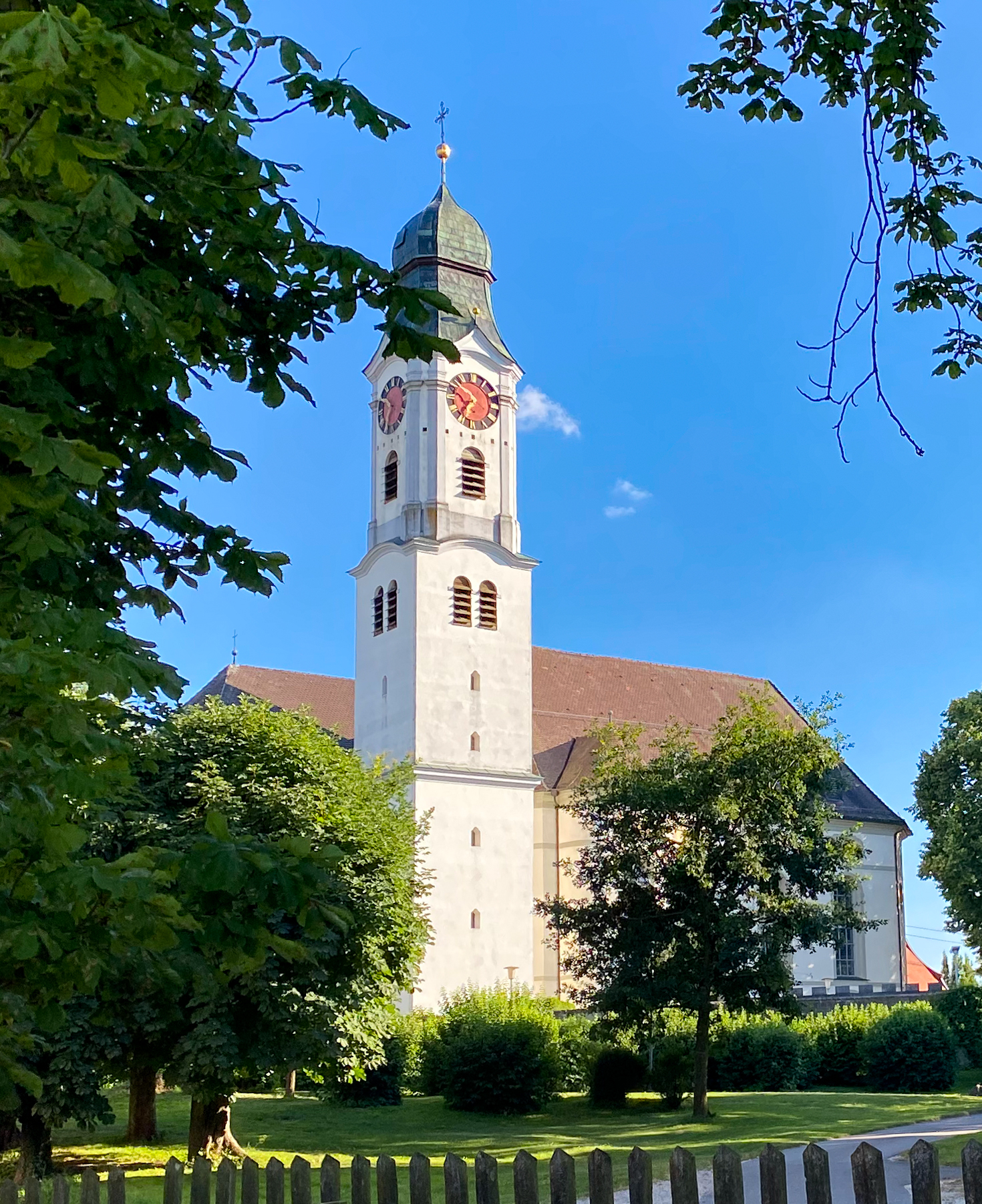 St. Martin (Erbach)